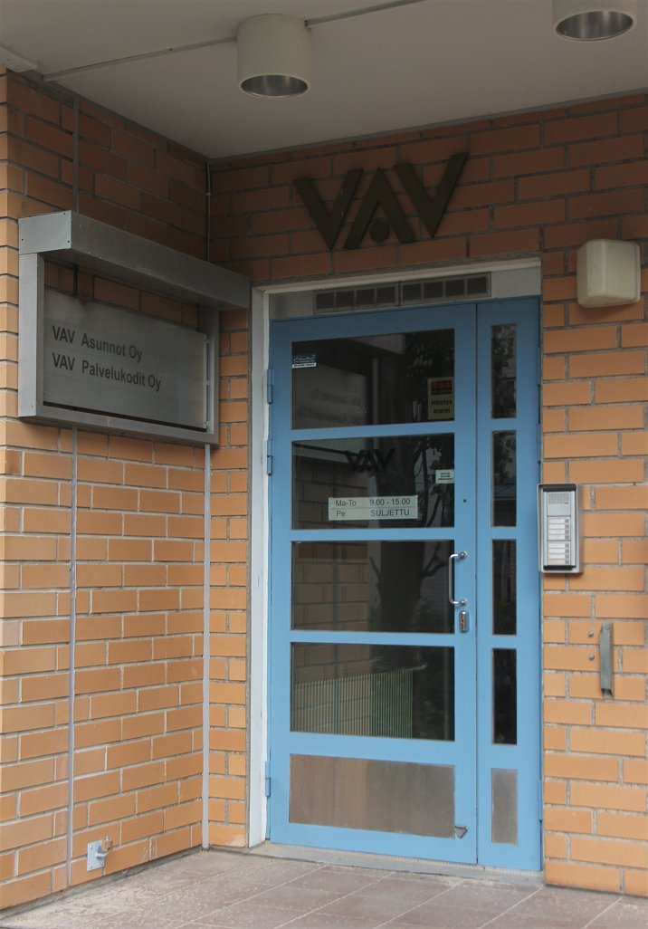 VAV Asunnot Oy on Vantaan kaupungin omistama yleishyödyllinen asuntoyhtiö, joka rakennuttaa, omistaa ja hallinnoi kaupungin vuokra-asuntoja.